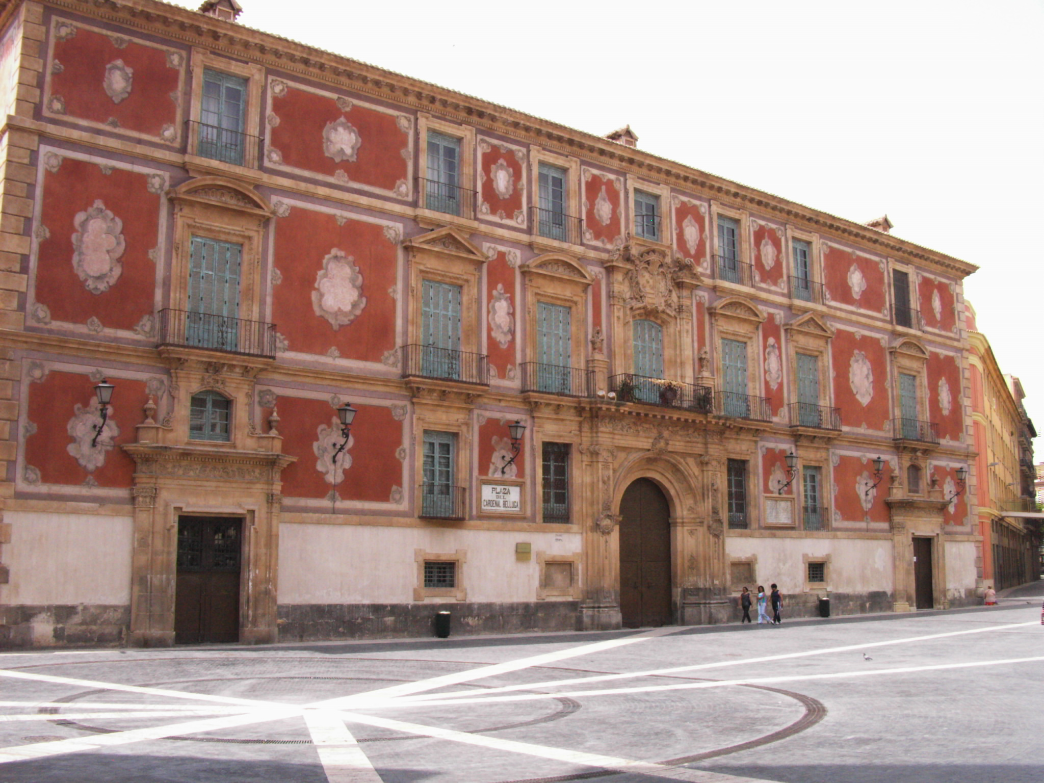 Edificio del obispado en Murcia en la plaza Belluga